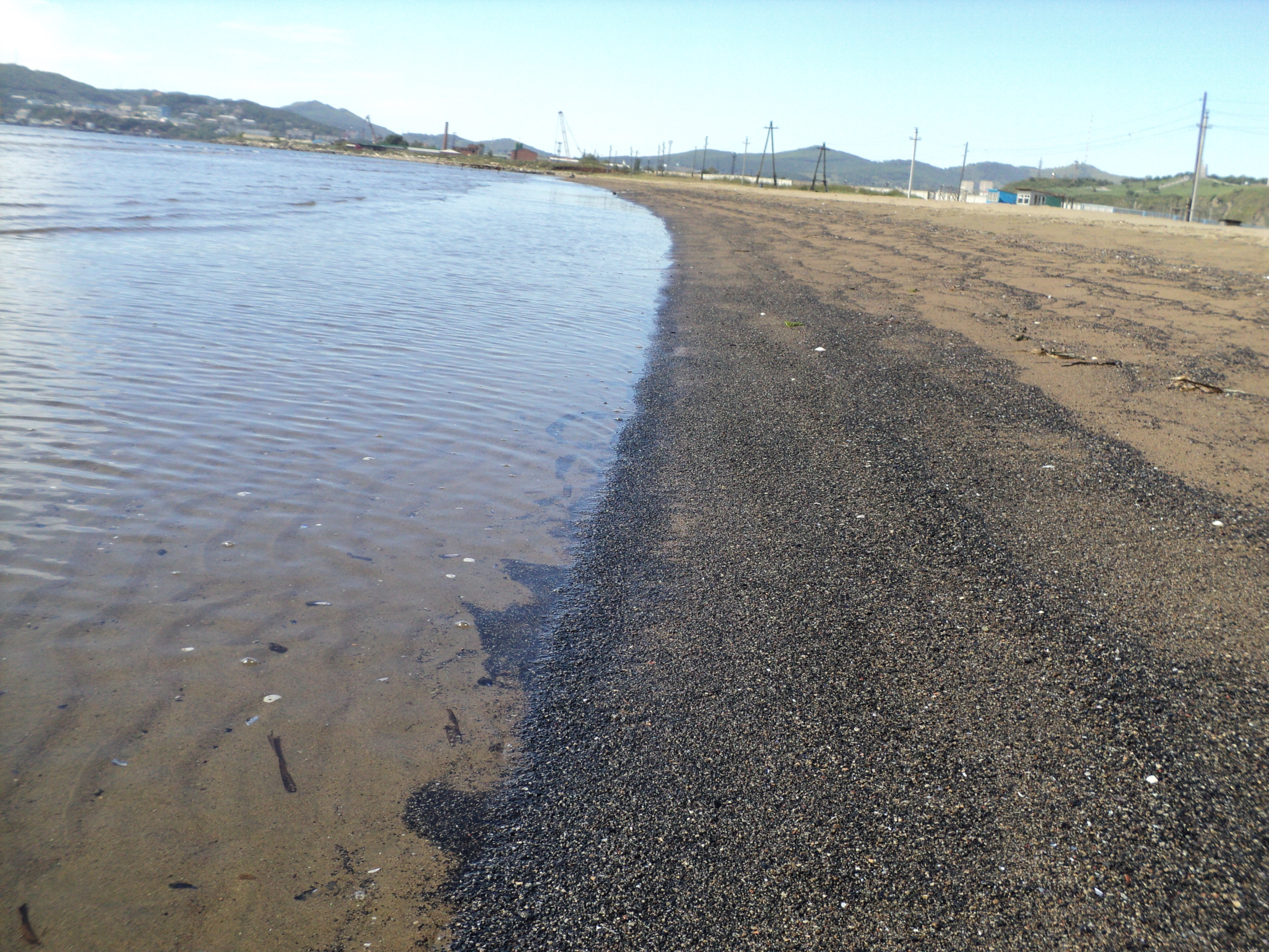 Загрязнённый угольной крошкой берег пляжа Находки